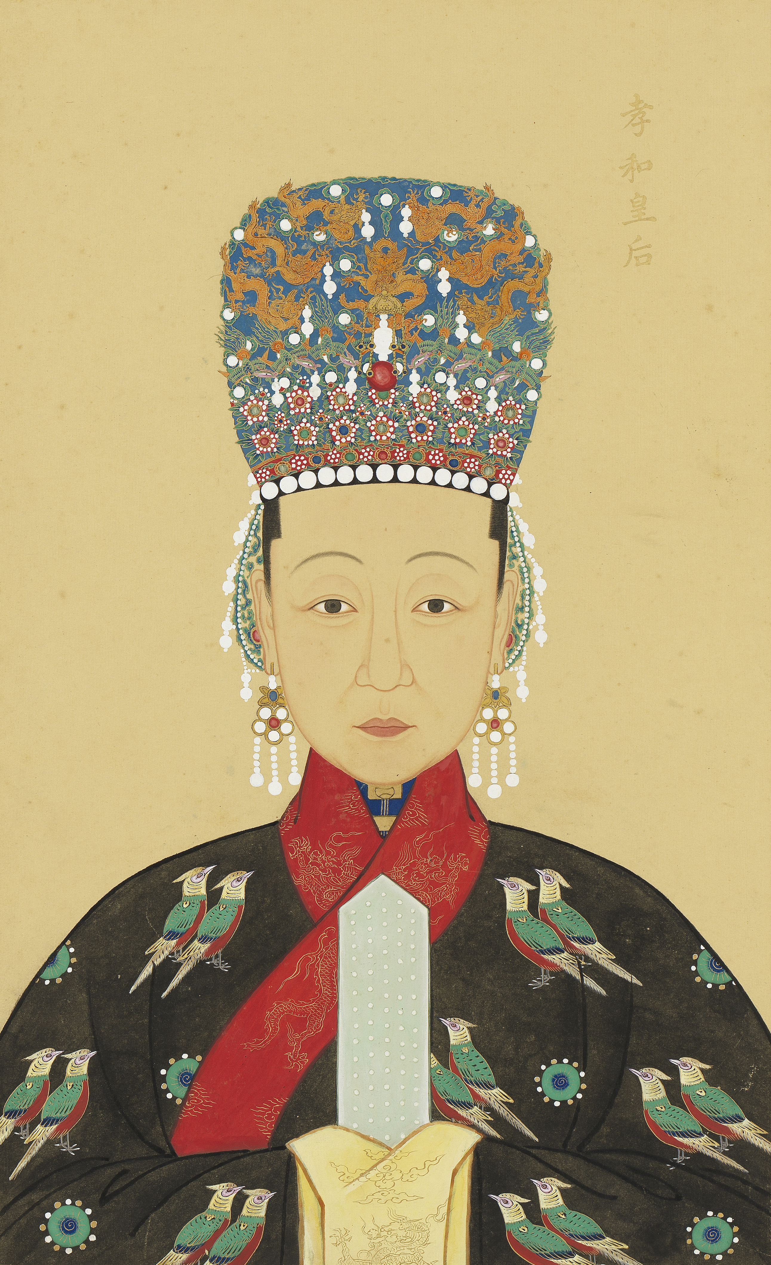 明代帝后半身像（二） 冊 孝和皇后；孝純皇后